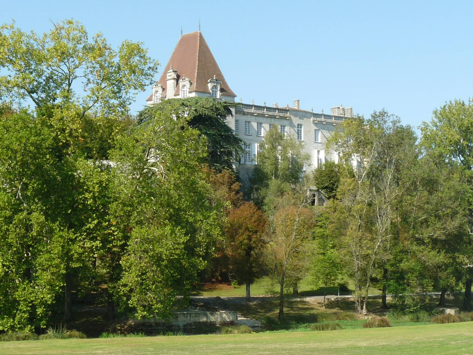 château de Bourg-Charente (16), France